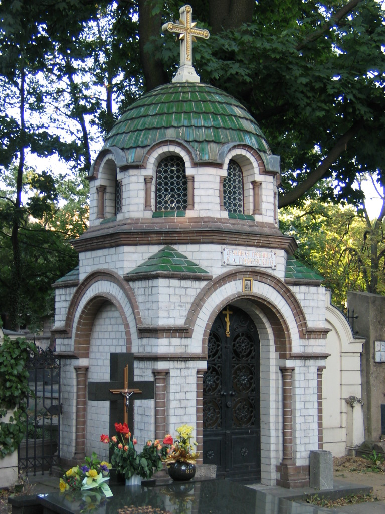 Grobowiec Gojżewskiego Łodzi